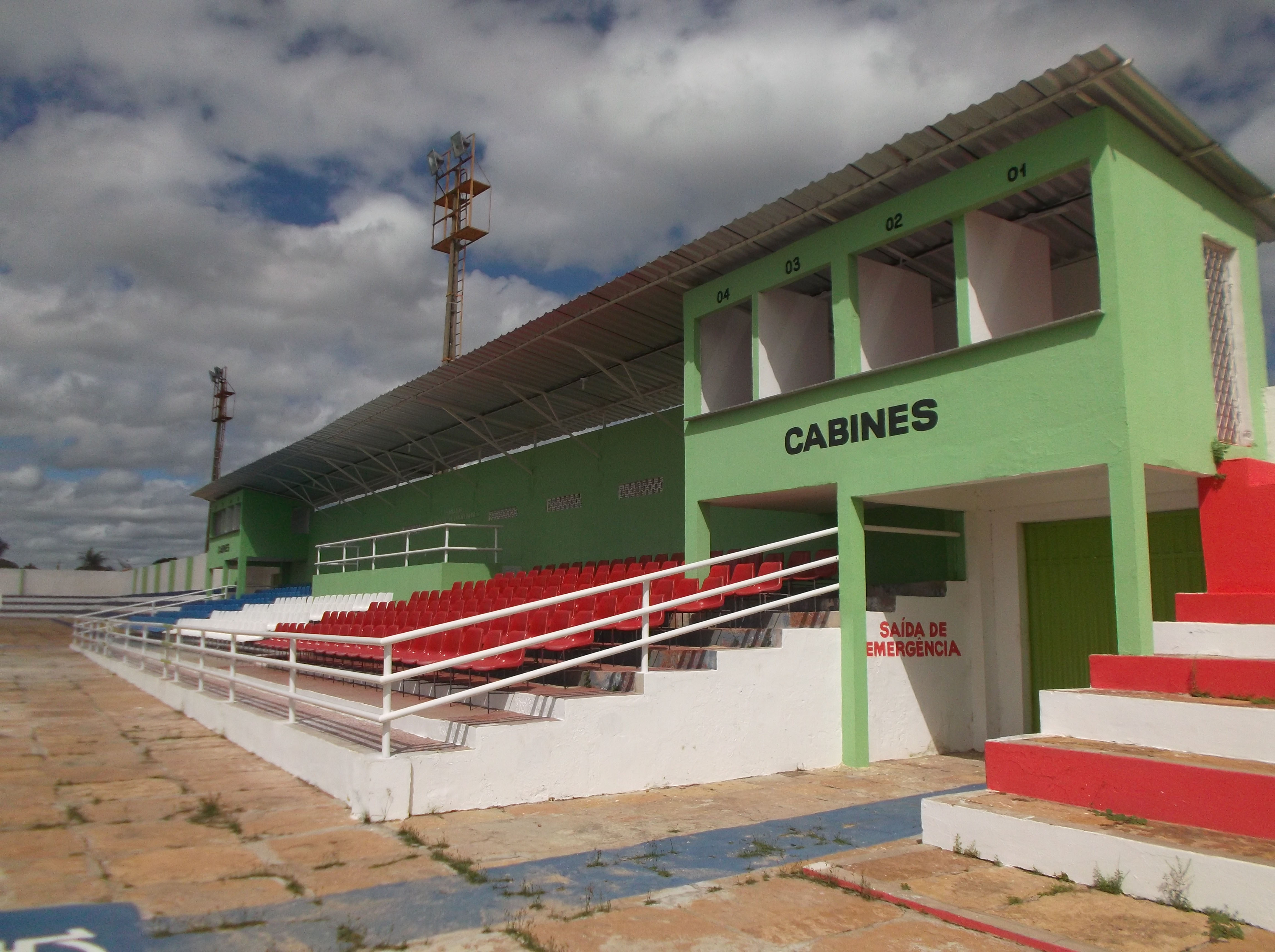 Vista de arquibancada do Estádio Deusdeth de Melo, em Campo Maior-PI.